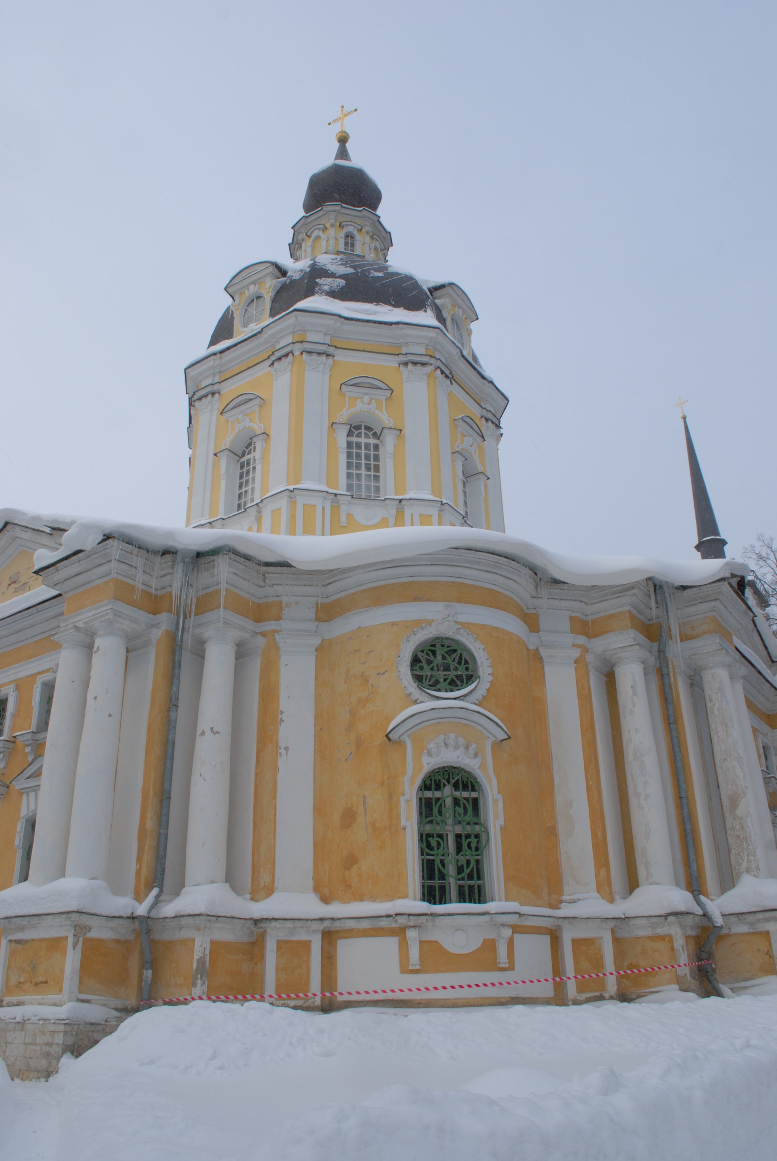 Церковь Спаса Нерукотворного Образа (Москва и Московская область, Троицк, село Вороново)